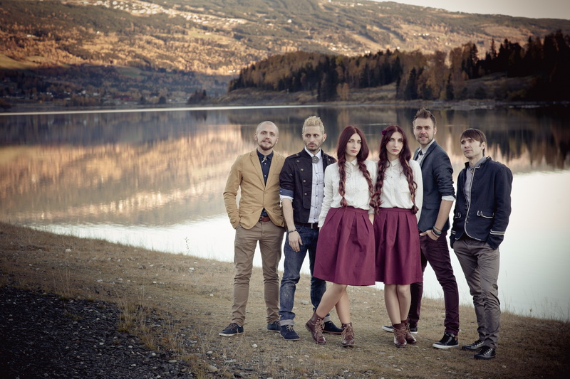 Атмасфера, 2015 р. під час туру в Норвегії